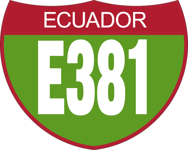 Disco de Identificación Ruta E381